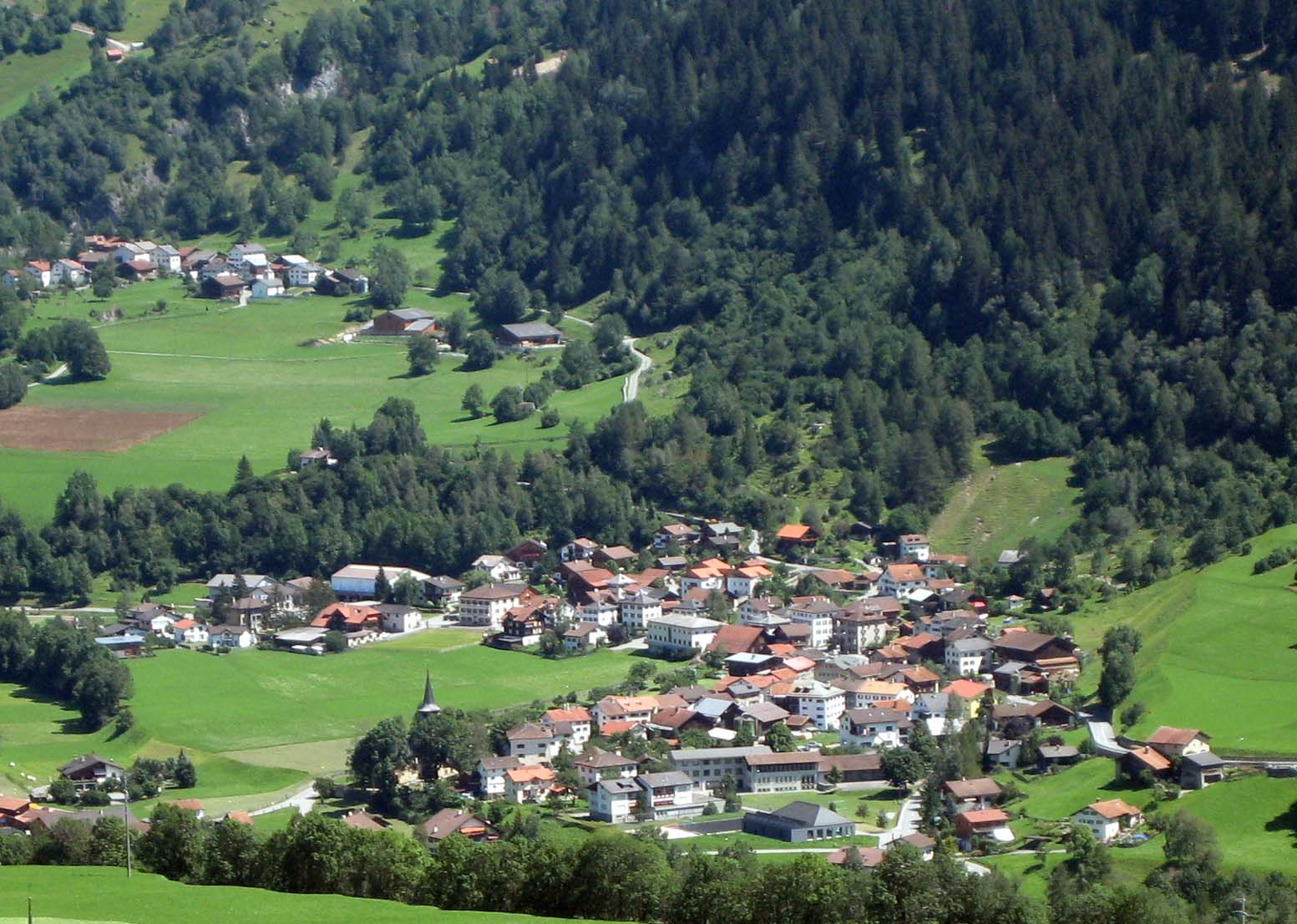 Zillis/Reischen